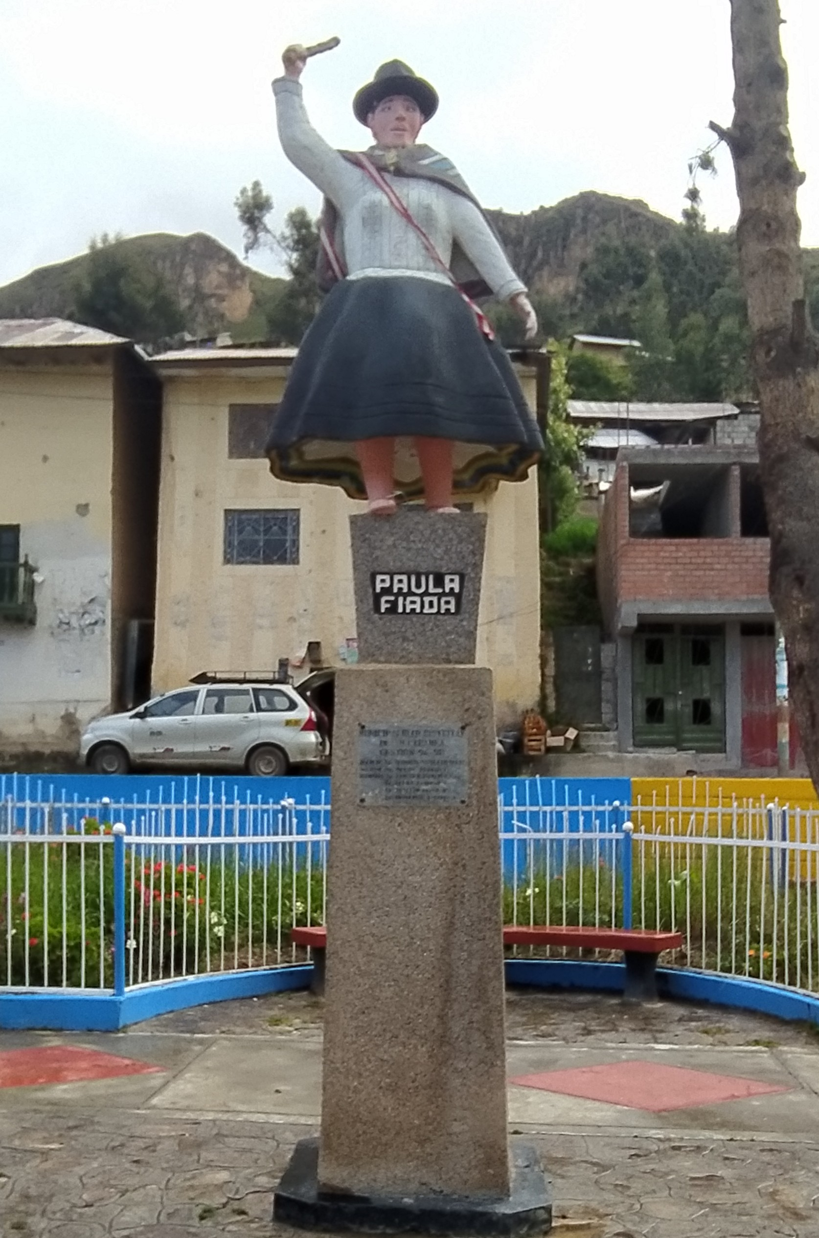 Monumento en honor a Paula Fiada. Distrito de Vilcabamba, provincia Daniel Alcides Carrión, departamento Pasco.